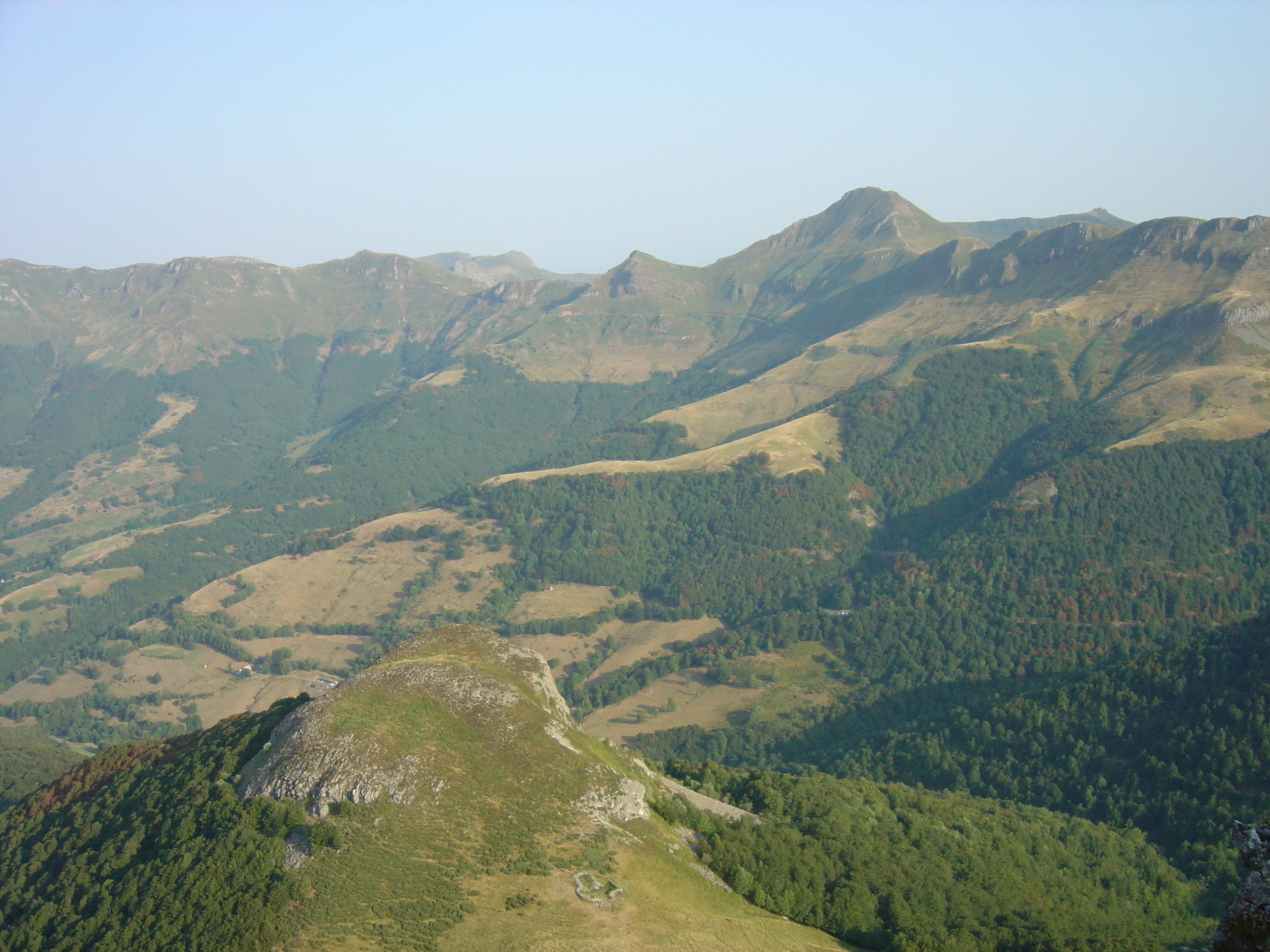 Les Monts du Cantal depuis le sommet du Puy Griou